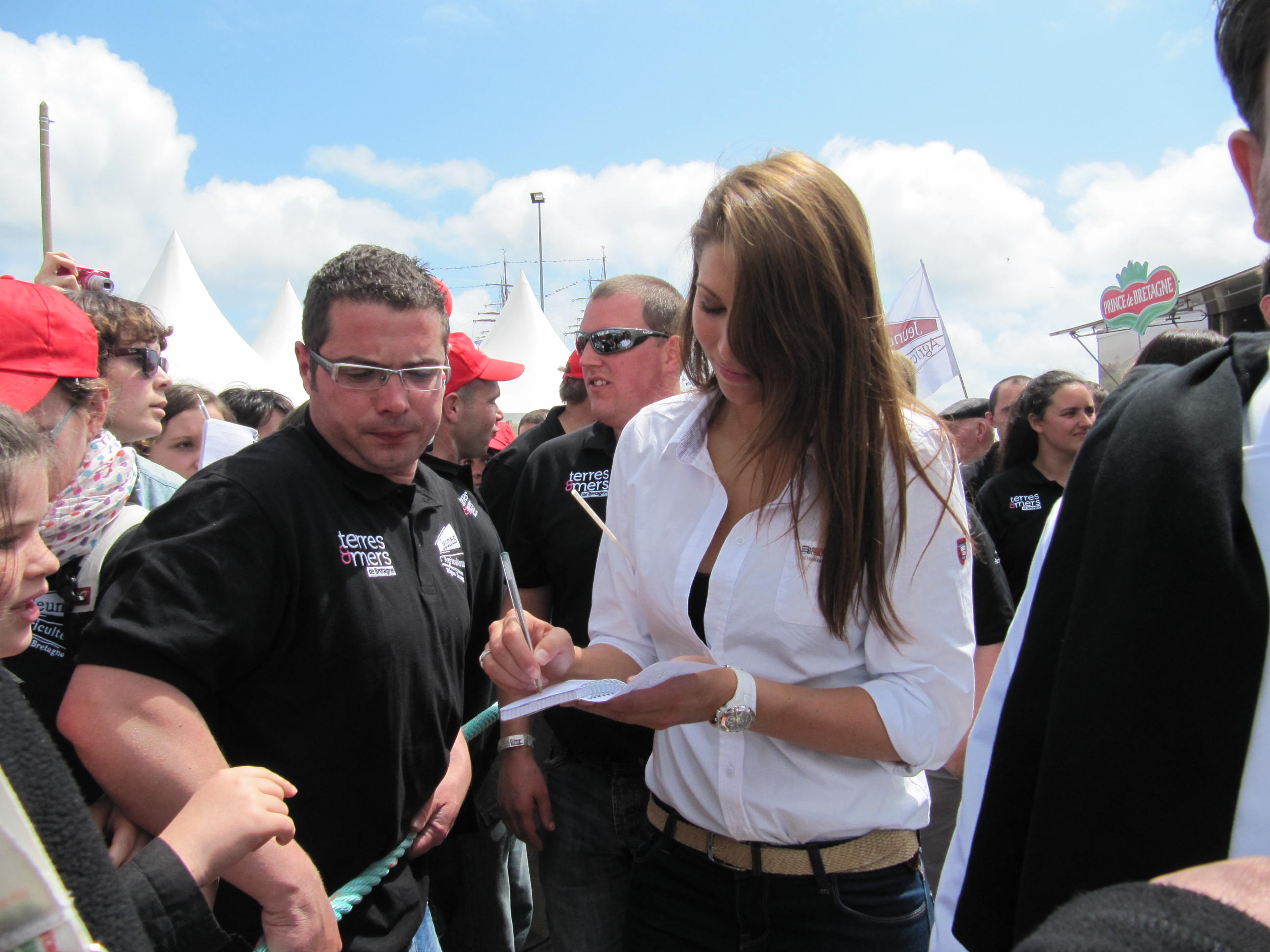 Laury Thilleman, Miss France 2011, Nolwenn Leroy et les Frères Morvan sur le village Terres et mers de Brest 2012